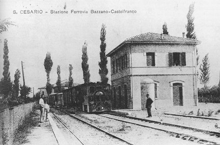 Stazione di San Cesario, sulla tranvia Castelfranco-Bazzano.